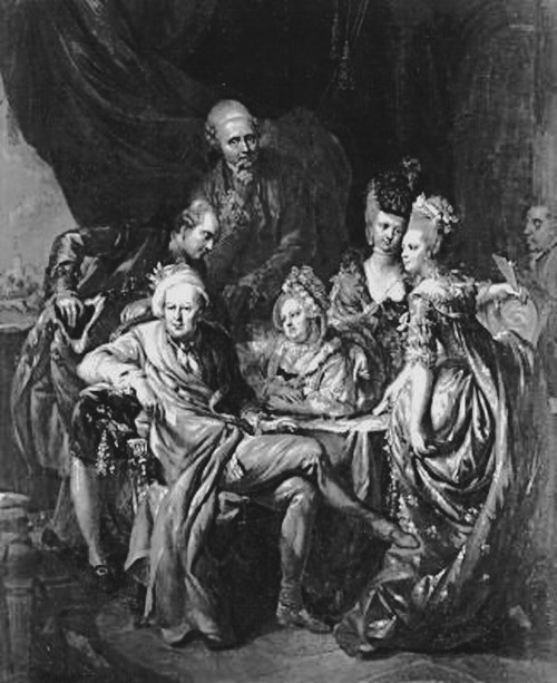 Urheber: Zeisig, Johann Eleazar , Maler, 1773 Darstellung: Fritsch-Seerhausen, Thomas Freiherr von, unten links Darstellung: Fritsch-Seerhausen, Sophia Freiin von, Bildmitte Darstellung: Fritsch-Seerhausen, Charlotte Gräfin von, rechts Darstellung: Fritsch-Seerhausen, Carl Abraham Graf von, Mitte links Darstellung: Saul, Margaretha von, 2. von rechts Darstellung: Vieth von Golßenau, Johann Julius, oben Verwalter: Dresden, Staatliche Kunstsammlungen Dresden (SKD), Gemäldegalerie Alte Meister, Signatur/Inventar-Nr.: 3160 Material: Öl/Leinwand; 81 x 64 cm Zusatzinformation: 1948 aus Seerhausen (Kreis Riesa); 1926 bei Baron von Fritsch, Weimar; Inv.-Nr. S 82; Bildausschnitt links: Ausblick in eine Landschaft mit Schloß Seerhausen